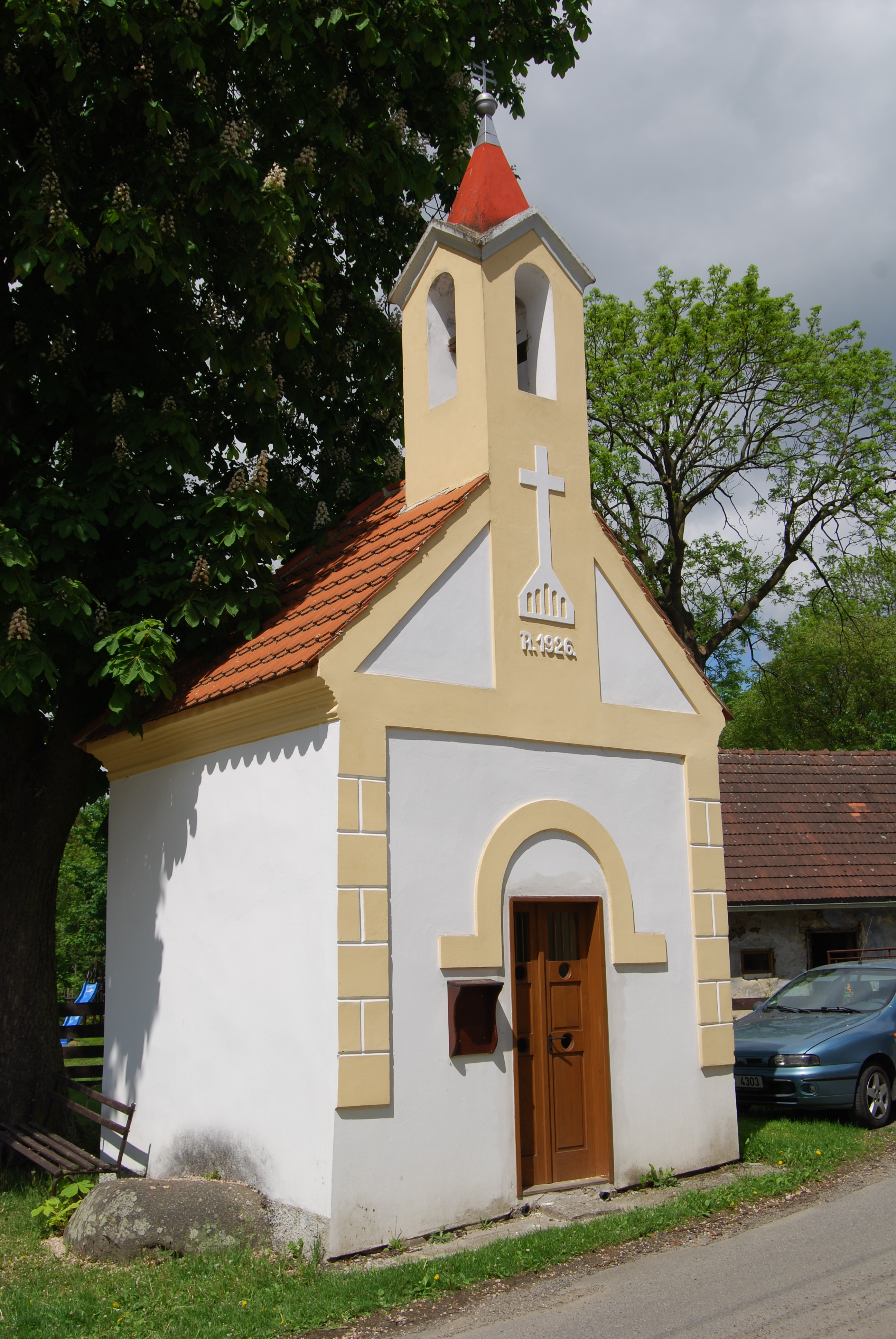 Kaple sv. Jana Nepomuckého u rybníka v obci. Něžovice (okres Písek). Česká republika.